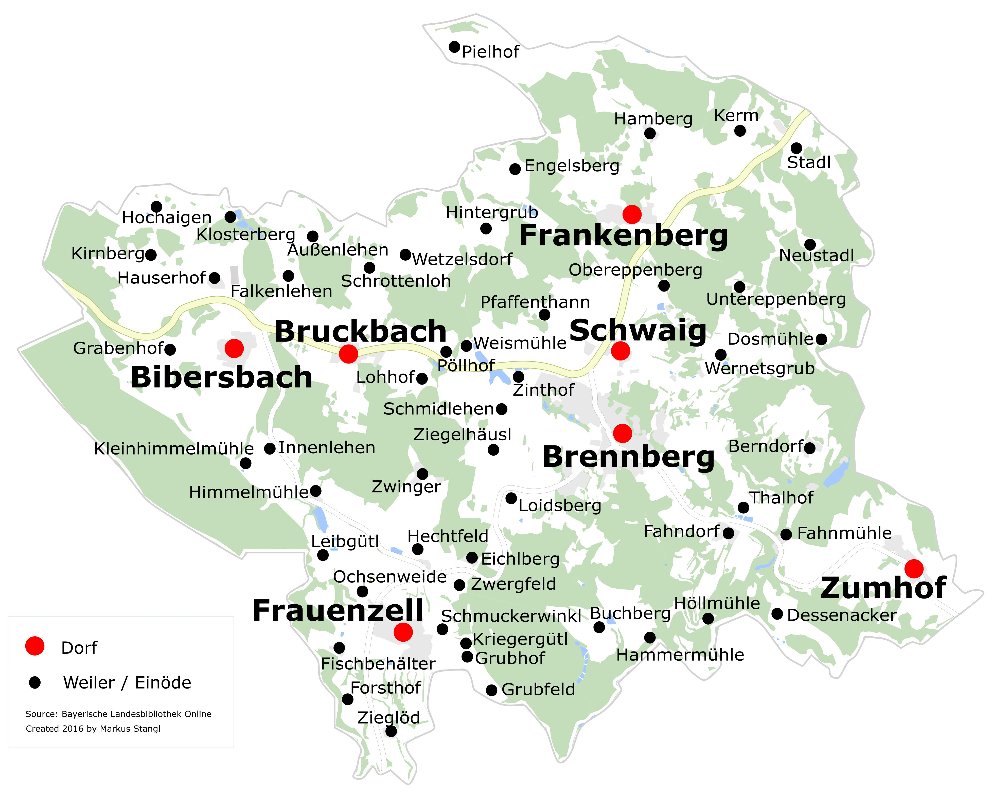 Gemeinde Brennberg mit Ortsteilen